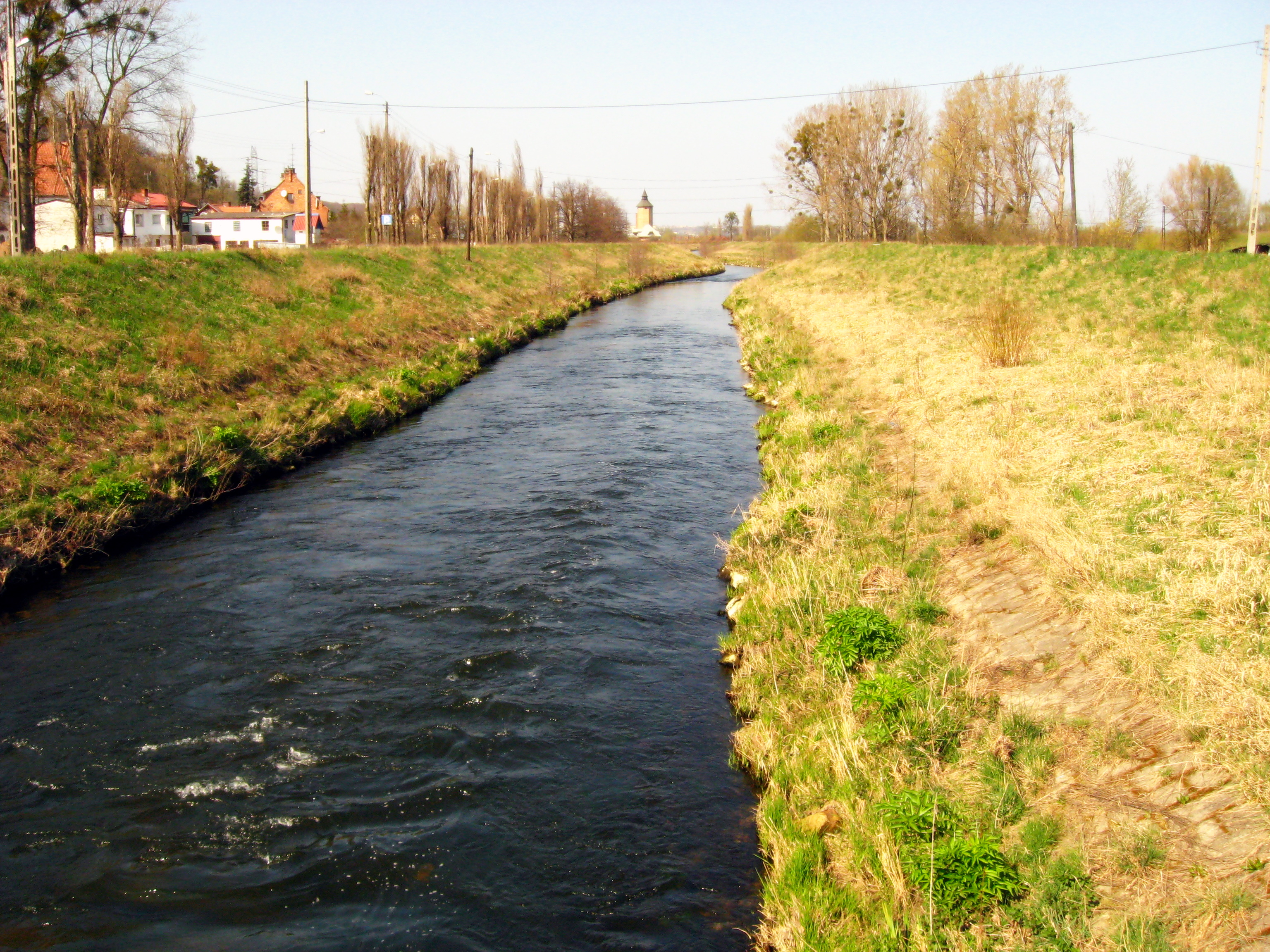 Rzeka Radunia, Gdańsk Święty Wojciech.